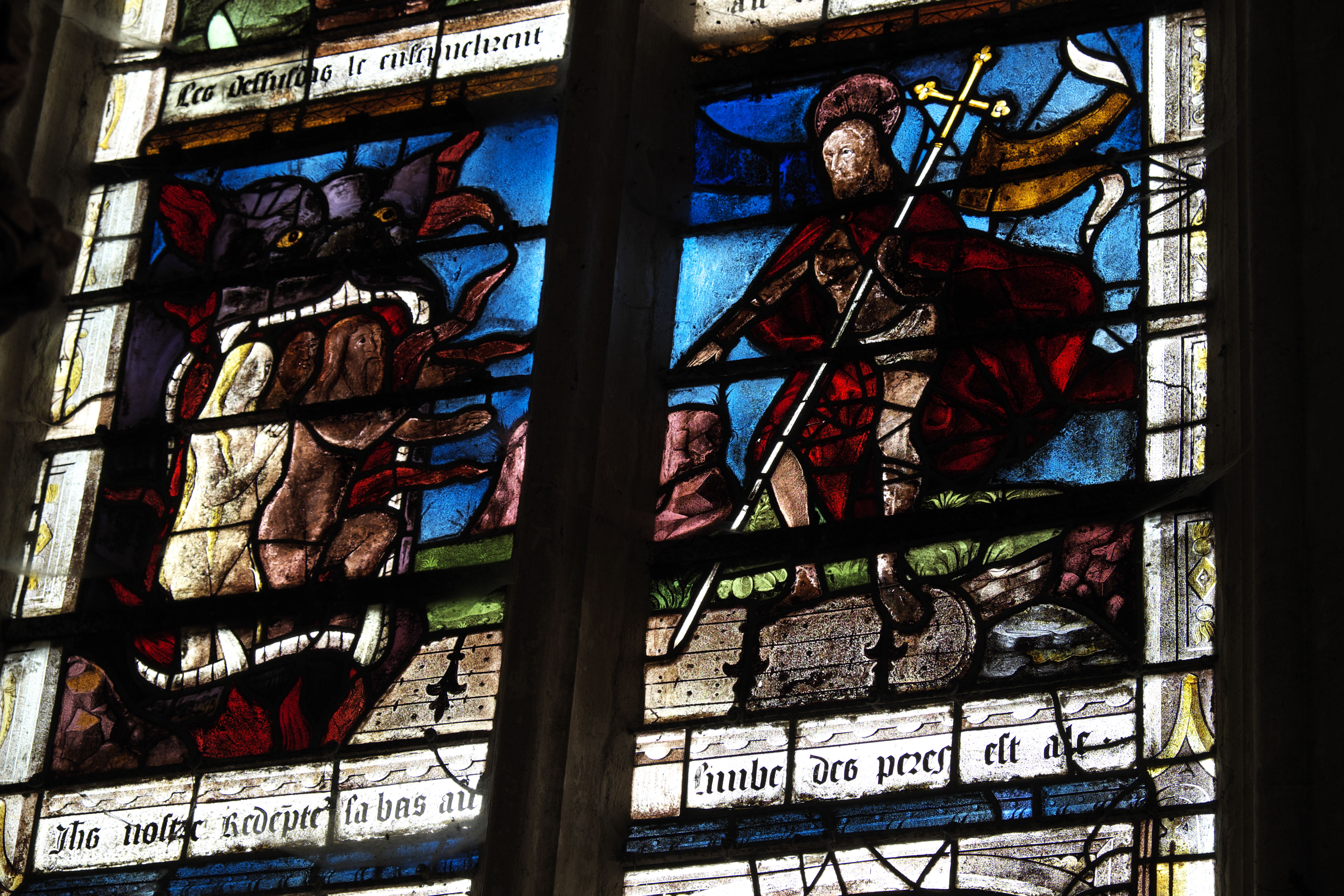 Katholische Kirche Saint-Remi in Ceffonds im Département Haute-Marne (Champagne-Ardenne/Frankreich), Bleiglasfenster (baie 0) im Chor, um 1510; Darstellung: Kreuzigung, Grablegung und Höllenfahrt; Ausschnitt: Höllenfahrt Jesu .